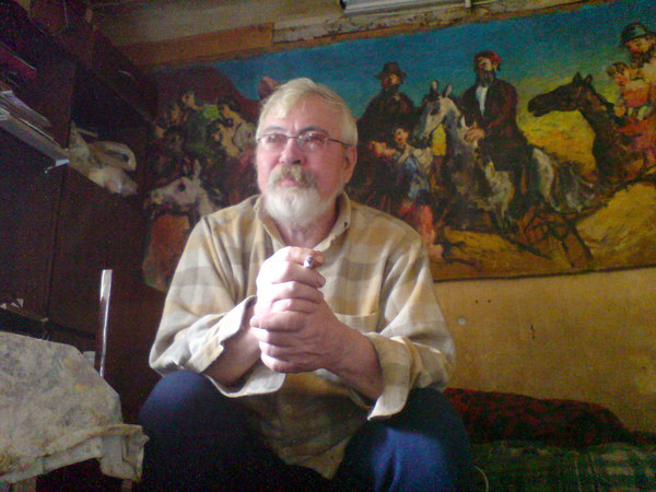 Владимир Яшке в мастерской